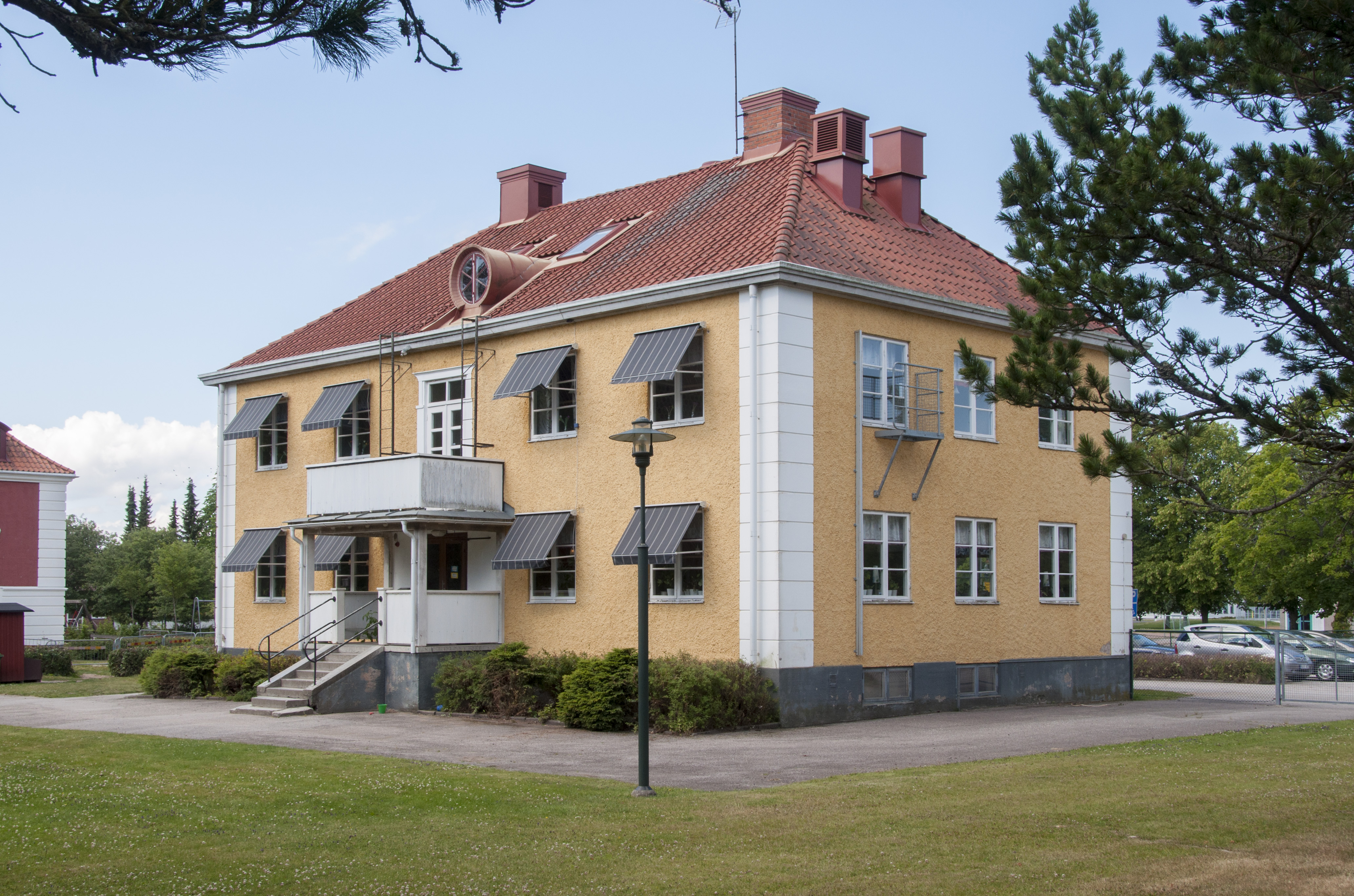 Gamla Ålderdomshemmet ,byggt år 1931 och var i bruk till 1956 då det nya ålderdomshemmet stod klart. Huset blev då kommunalhus, till år 1974 då Centrumhuset stod klart.